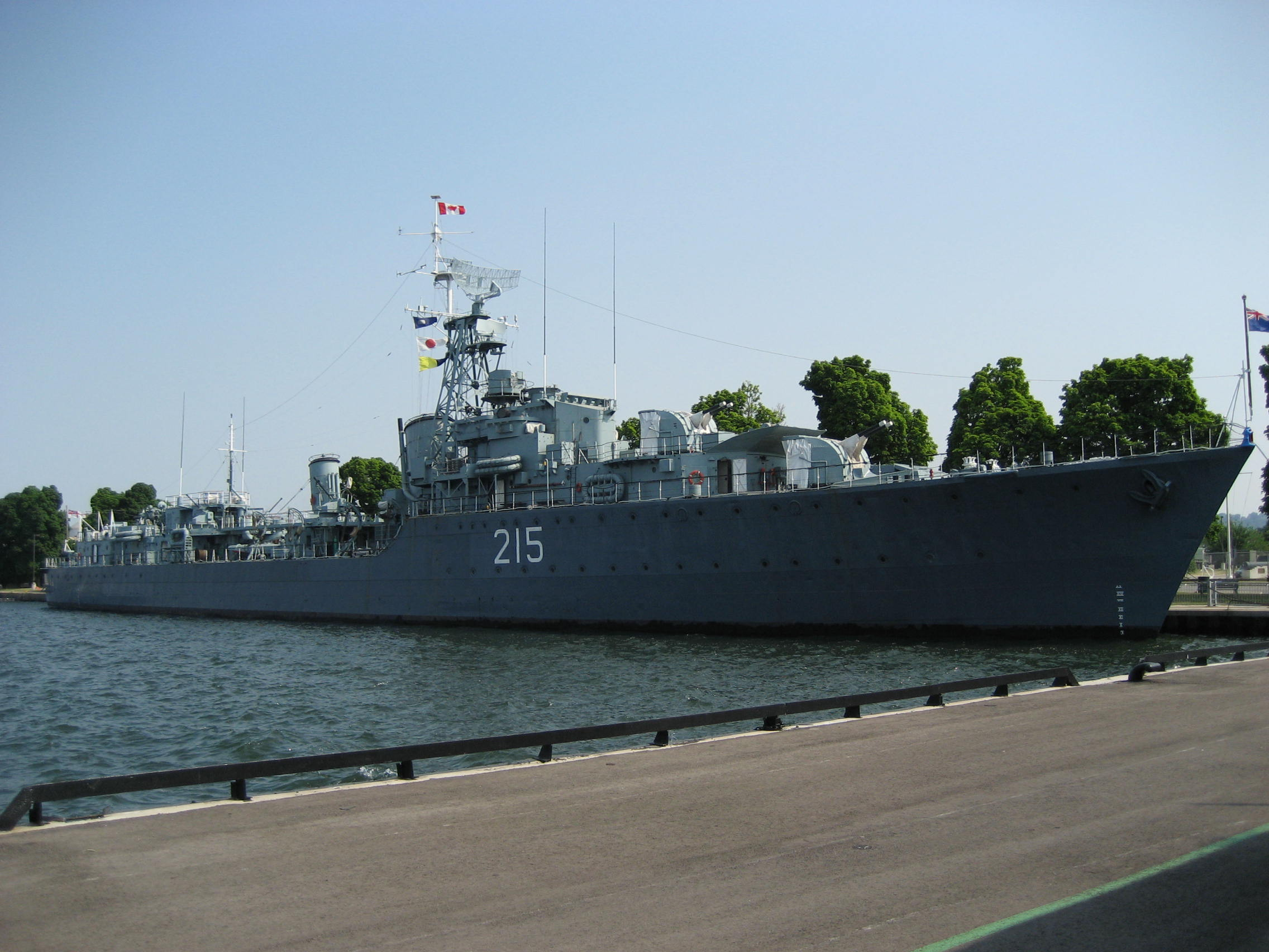 HMCS Haida, Pier 9, Hamilton, Ontario